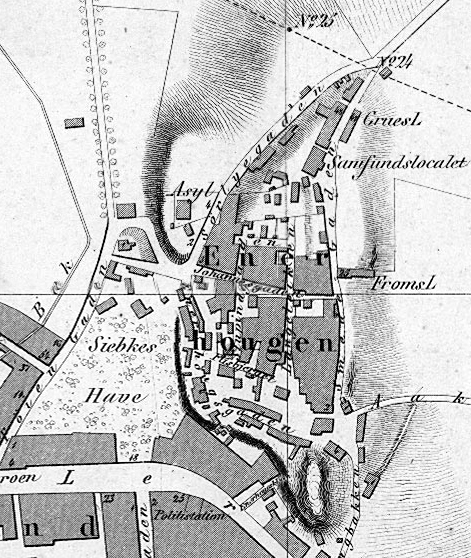 Kart over Enerhaugen, 1861.